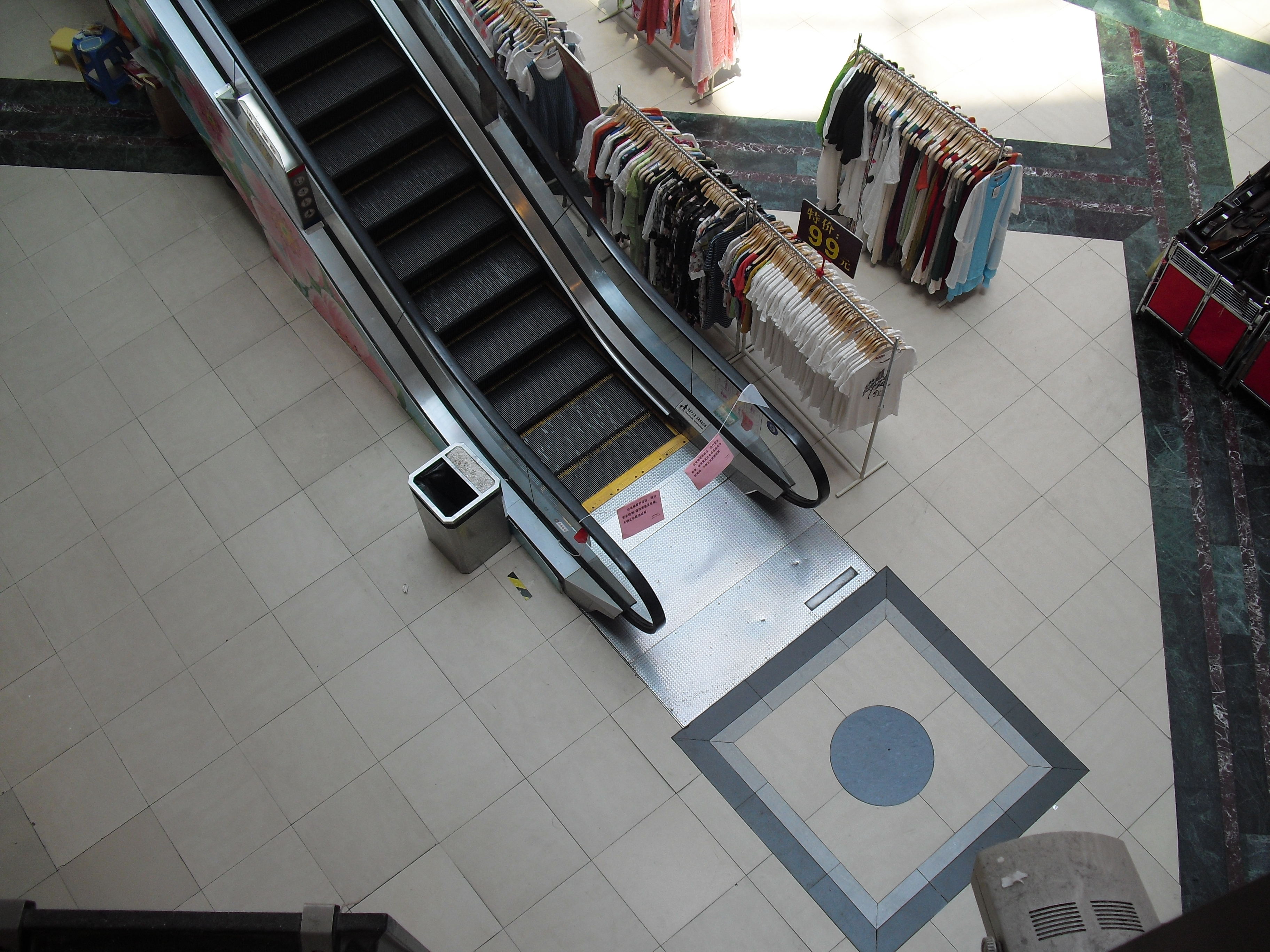 由苏州申龙制造，位于上海百联中环内7·26事件发生后被勒令停运的自动扶梯。